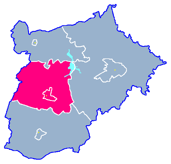 Locator maps for communes in województwo zachodniopomorskie : Tuczno gm.png (podział na gminy)